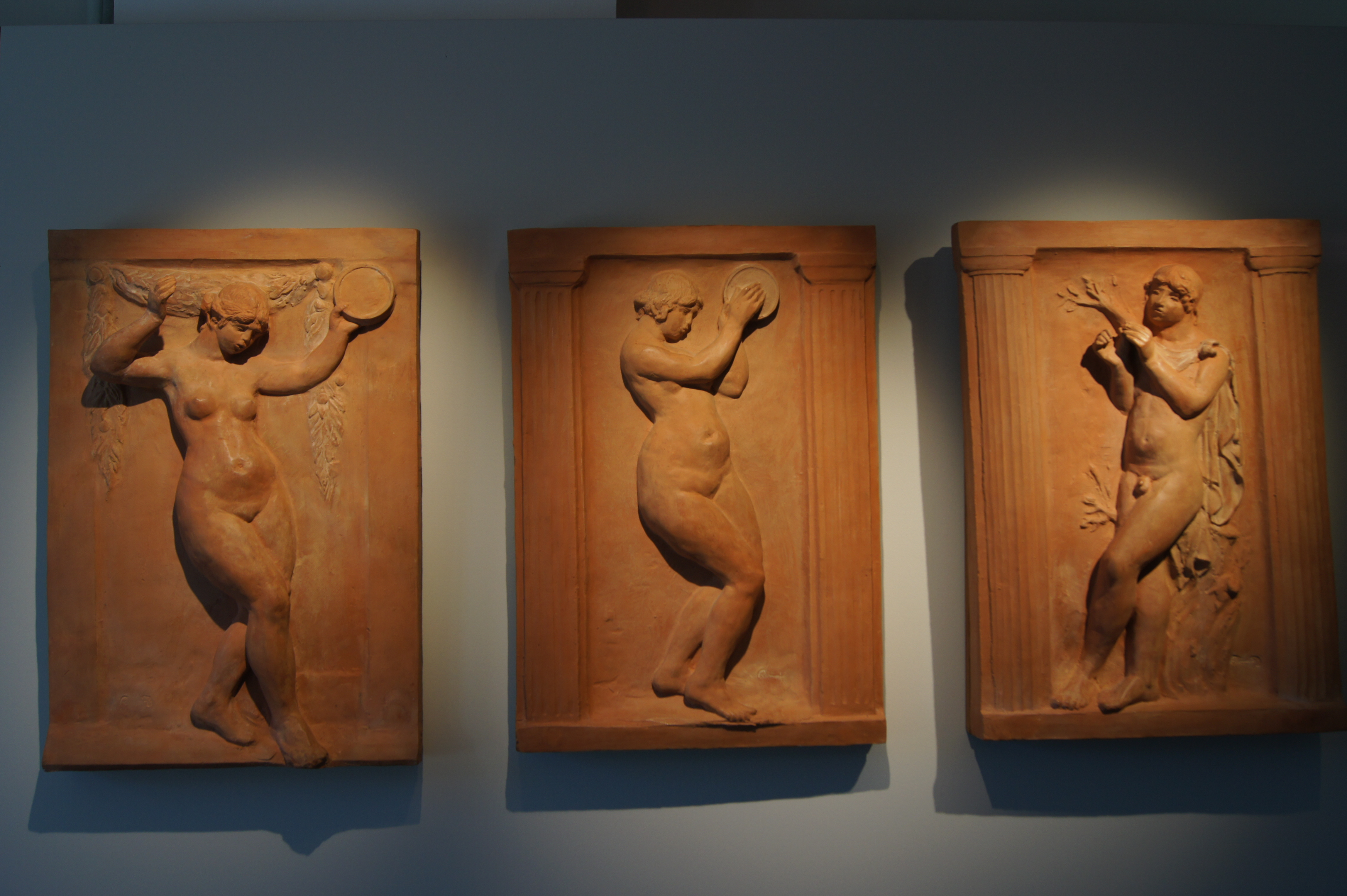 Bas-relief aux danseuses, inspiré de la sculpture grecque classique, exposé au Musée Renoir de Cagnes-sur-Mer.